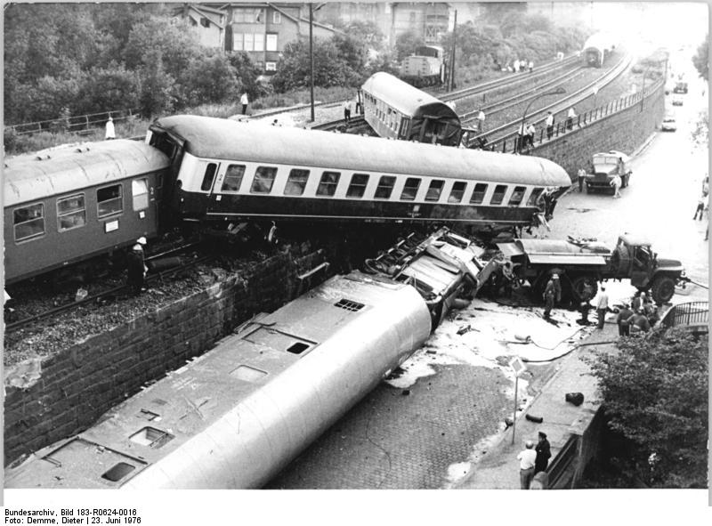 ADN-ZB Demme 23.6.1976 Bez. Erfurt: Zugentgleisung in der Nähe Eisenachs- In der Nähe des Bahnhofs Eisenachs entgleisten am 23.6.1976 aus bisher noch nicht geklärter Ursache vier Reisezugwagen des D 354 Berlin-Friedrichstraße - Paris. Ein Wagen stürzte um und kollidierte dabei mit einer Lokomotive, die auf dem Nebengleis leere Personenwagen rangierte. Fünf Fahrgäste und der Lokführer wurden schwer und 20 weitere Personen leicht verletzt. Die Verletzten erhalten im Kreiskrankenhaus der Stadt Eisenach alle notwendige ärztliche Fürsorge.